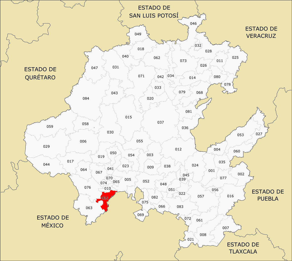 Municipio de Hidalgo